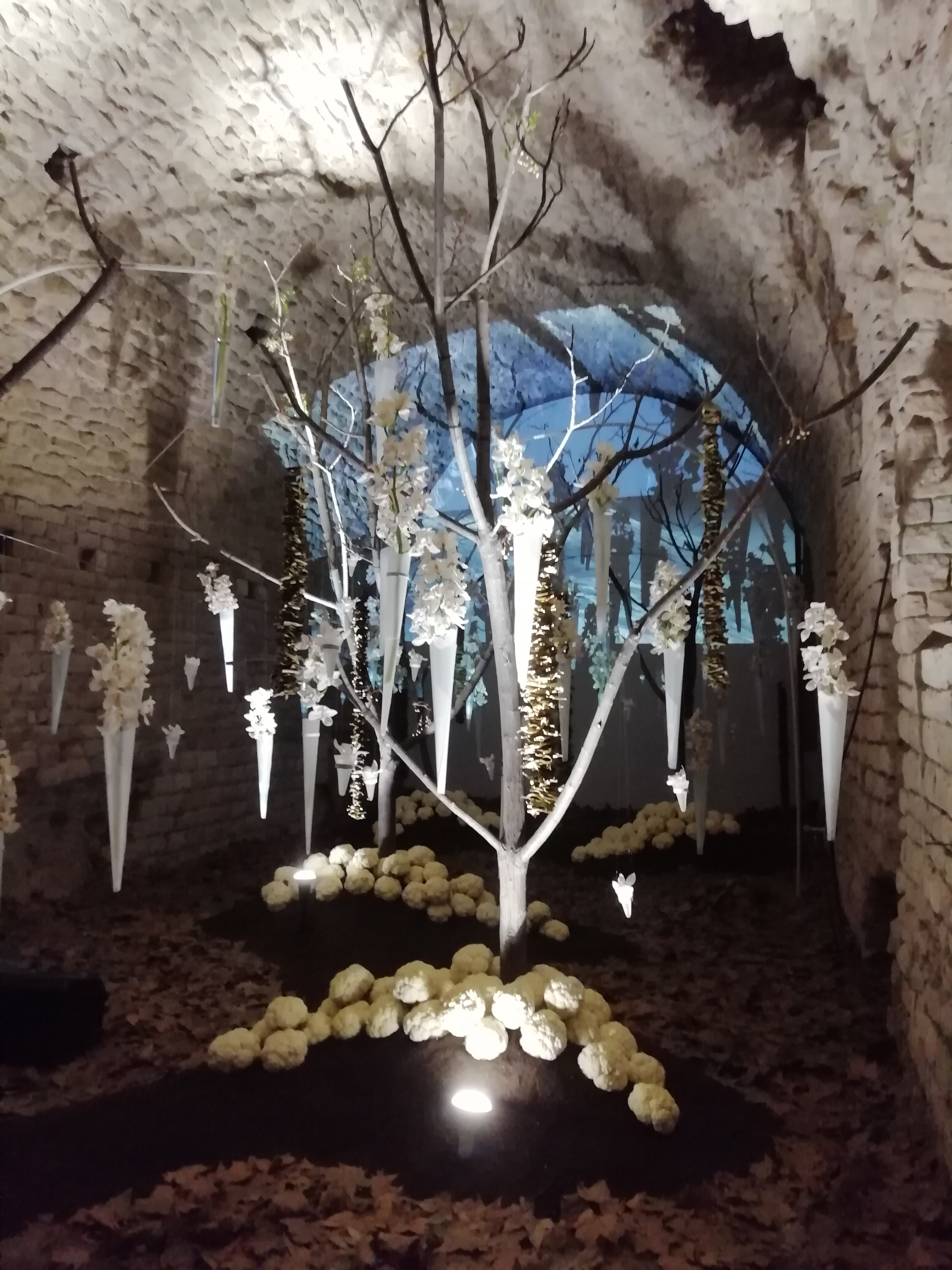 Temps de Flors Girona. Edició del 2019, als soterranis de la Catedral de Girona, amb elements multimèdia com projecció de vídeos al fons i sons